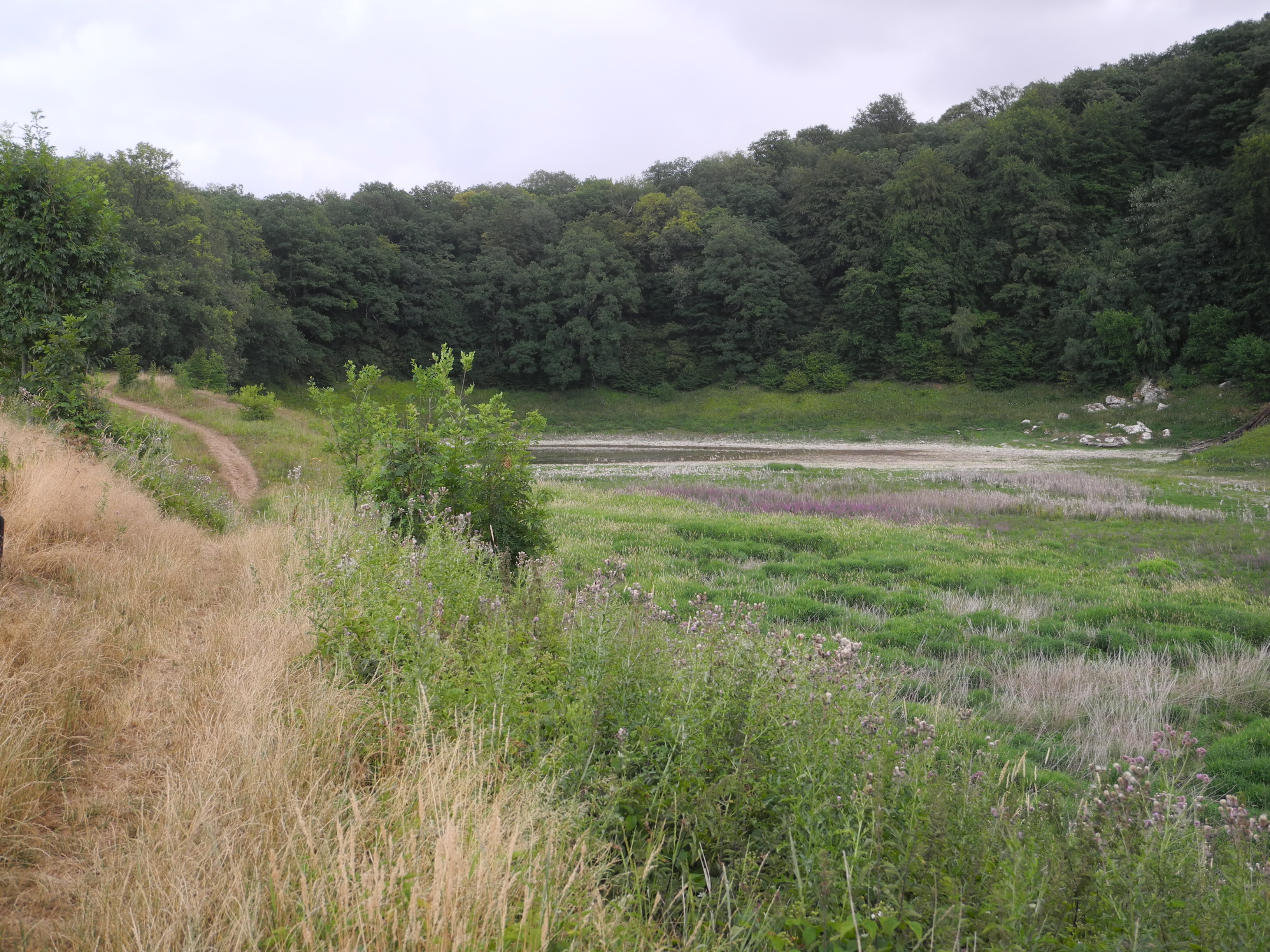 Der Bauerngraben ist ein episodischer See mit einer Bachschwinde (Ponor) des Glasebach, in der Gemeinde Südharz im Landkreis Mansfeld-Südharz, in Sachsen-Anhalt, Deutschland.